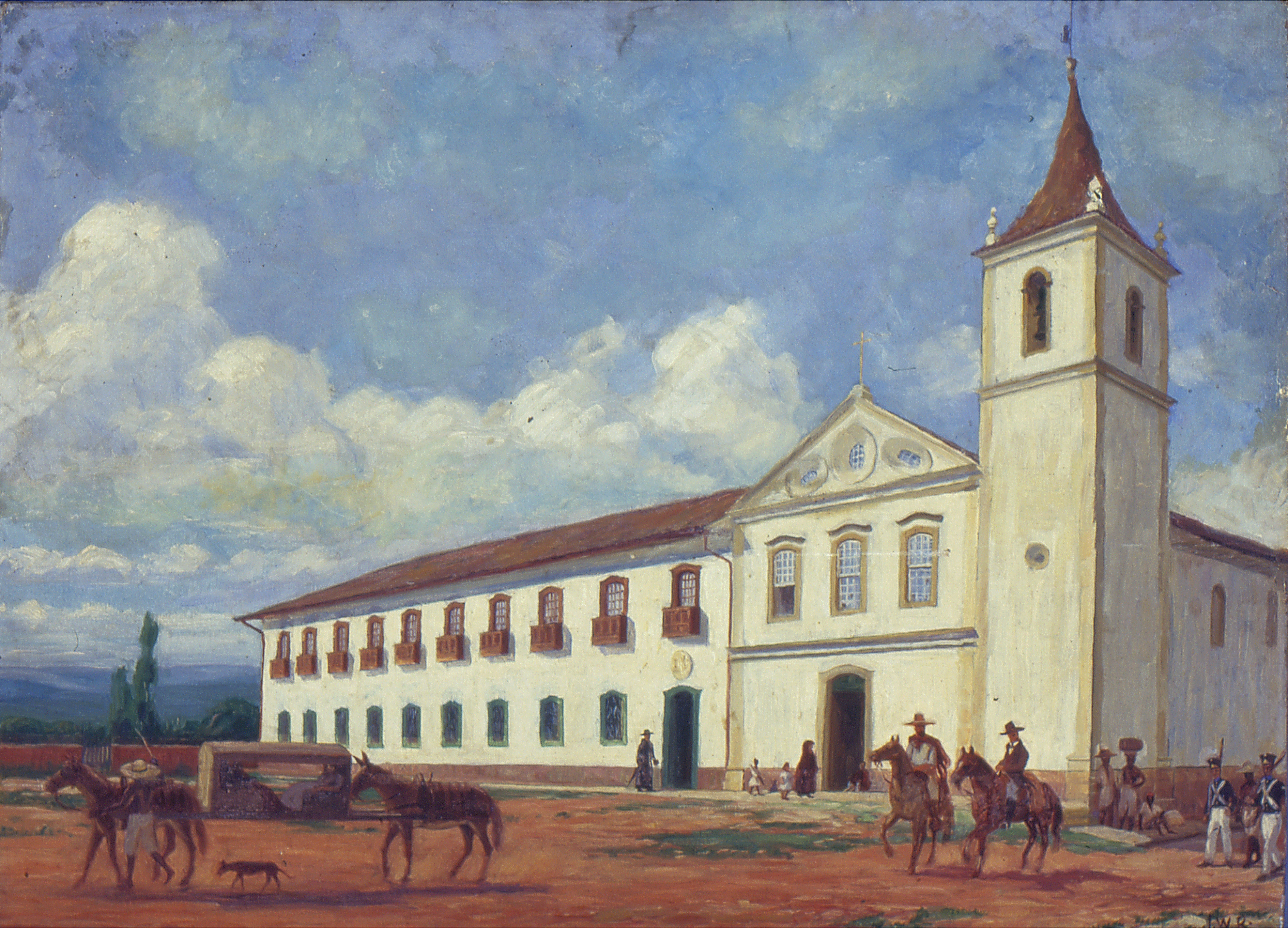 Obra que integra o acervo do Museu Paulista da USP. Coleção José Wasth Rodrigues - CJWR